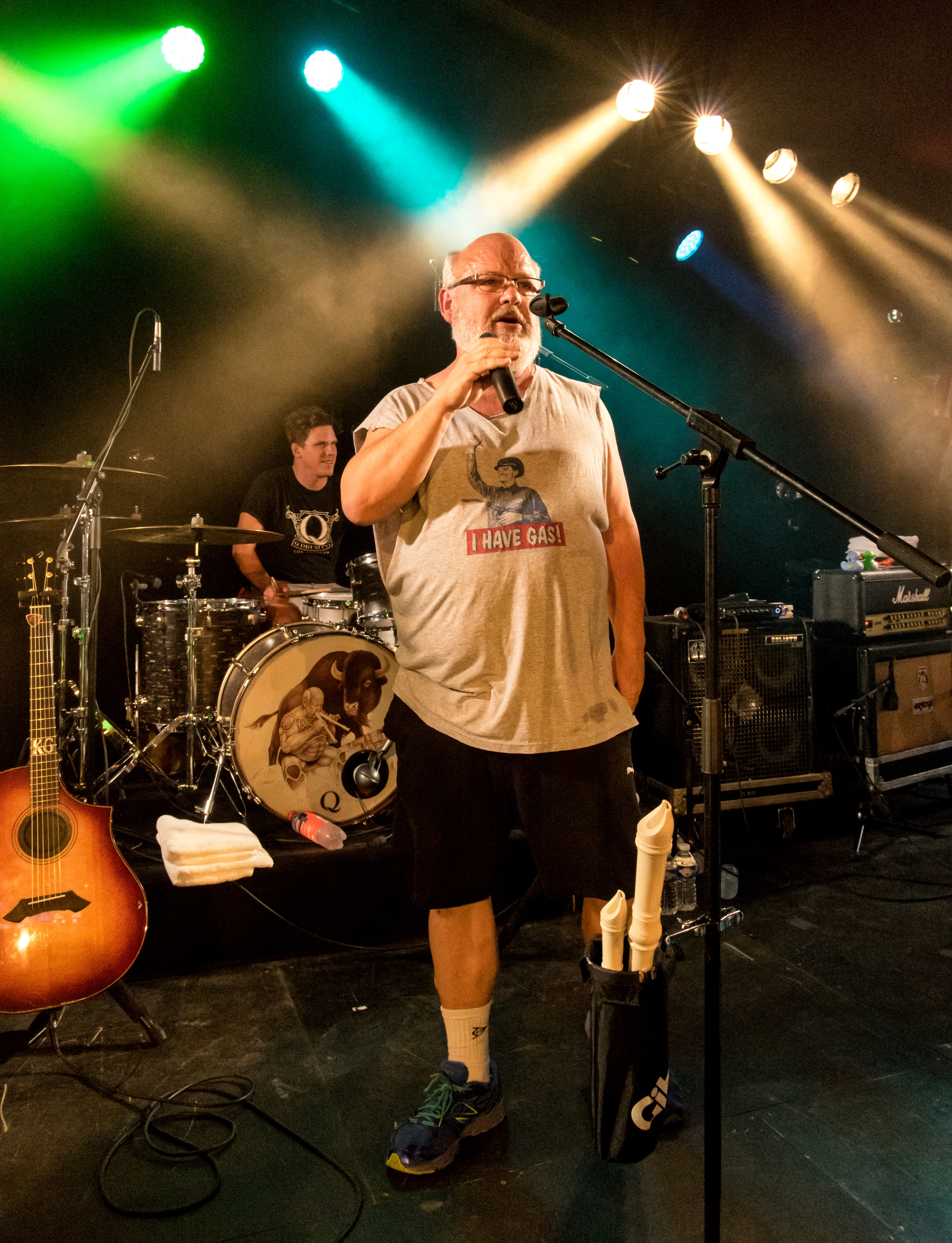 Bilder vom Zelt Musik Festival 2017 in Freiburg im Breisgau Kyle Gass Band